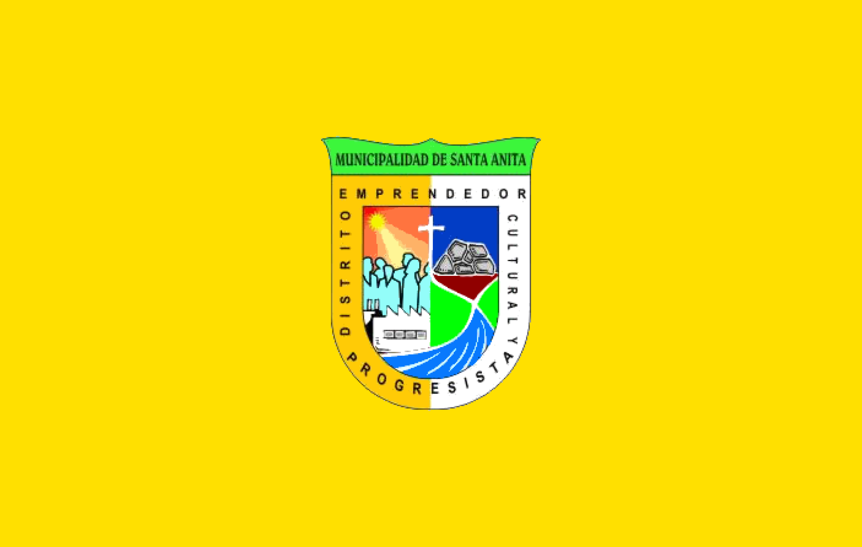 Santa Anita